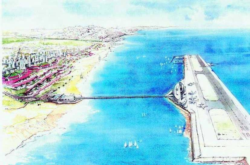 Artificial island, Tel aviv air port. sketch.